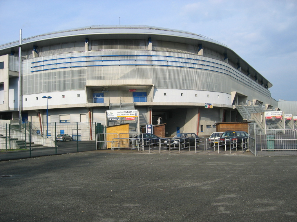 Stade Bonale de football Sochaux